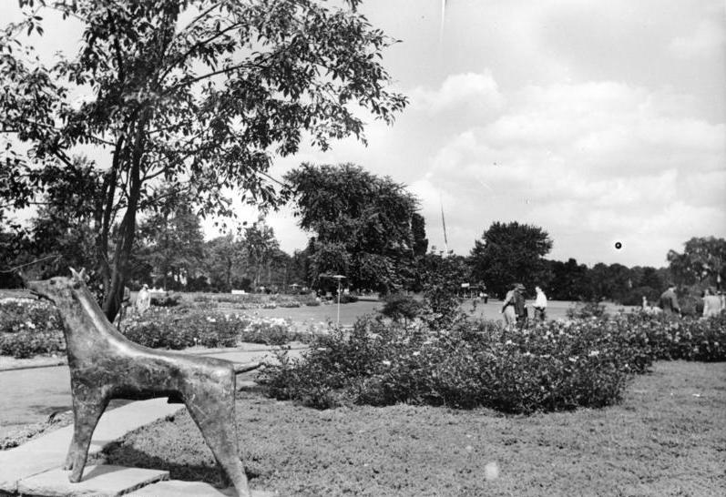 Erste Bundesgartenschau in Hannover